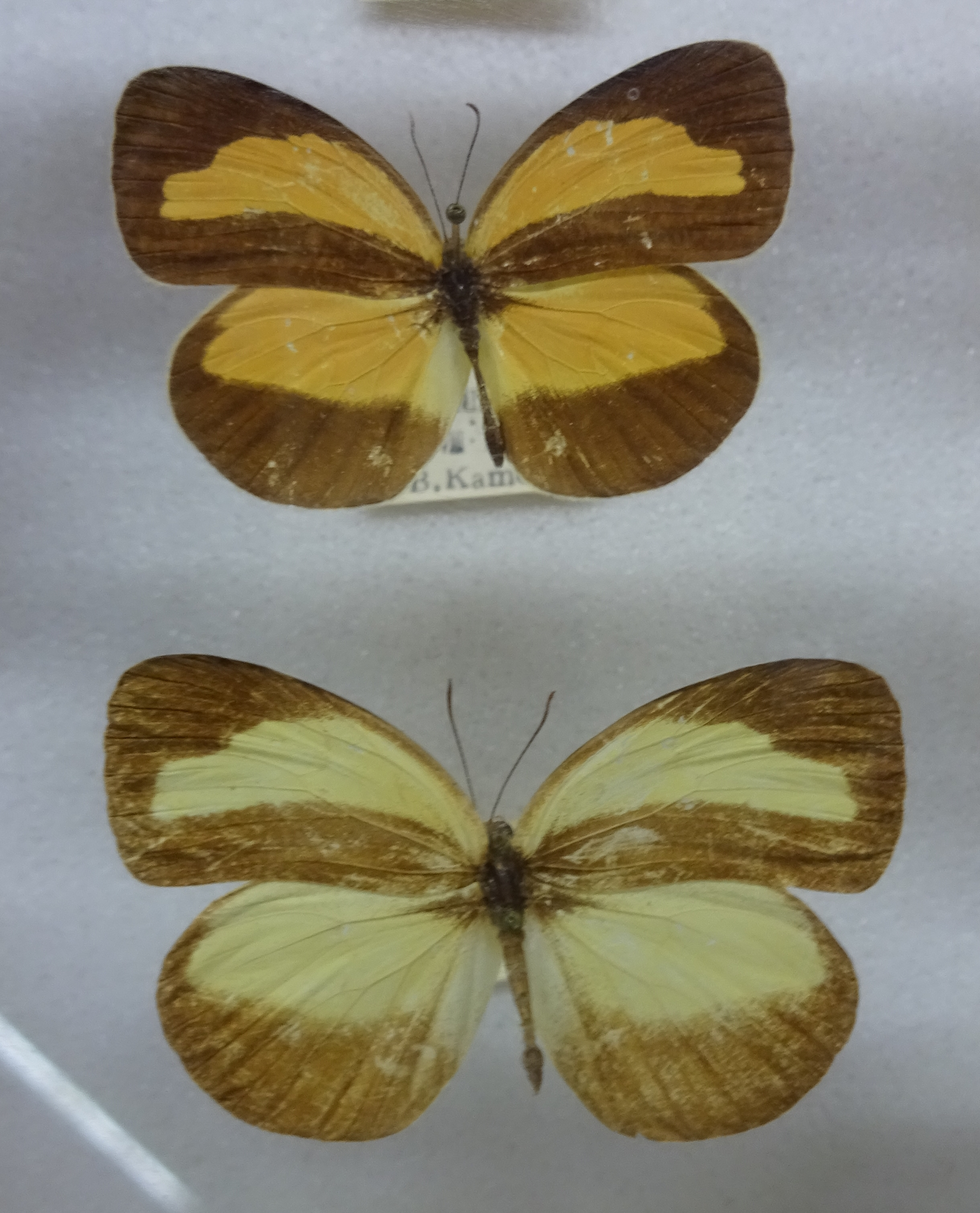 エサキキチョウ(アリタキチョウ)